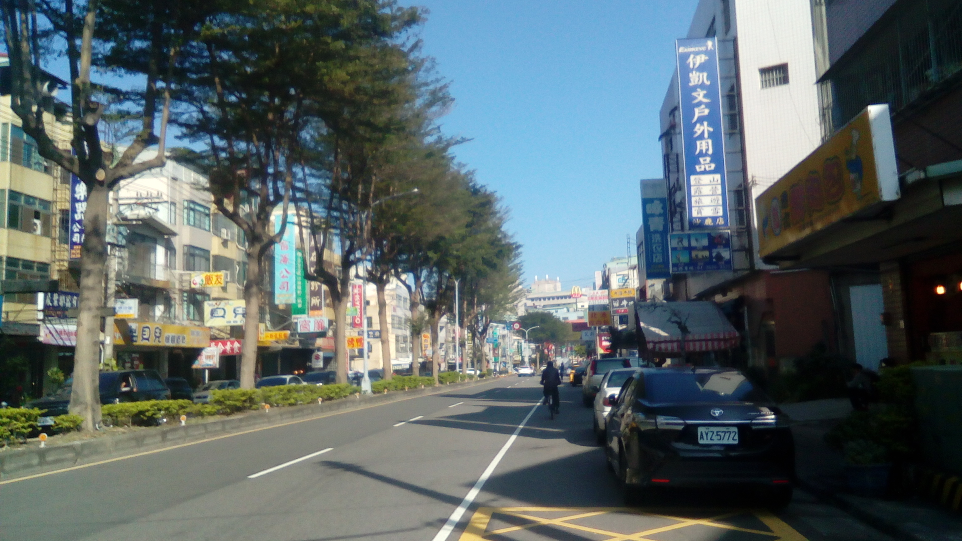 沙鹿市區，光田醫院附近之路段